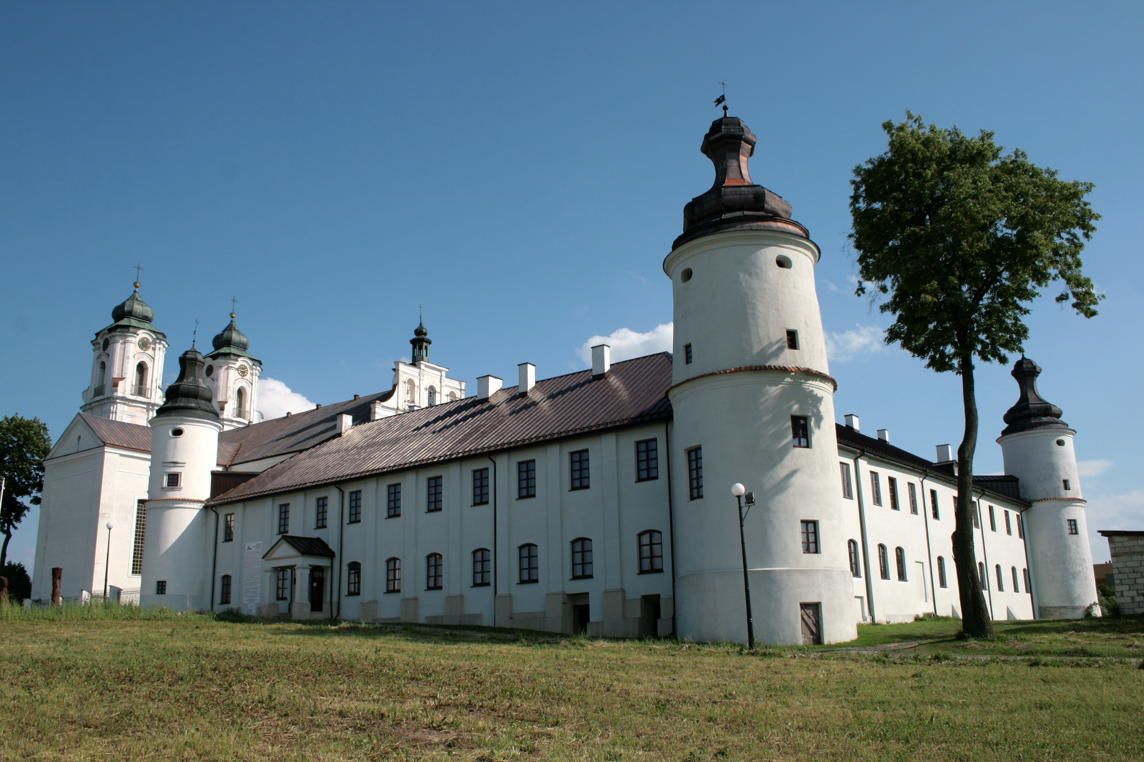 Sejny monastery